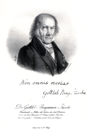 Portrait of Gottlob Benjamin Jäsche